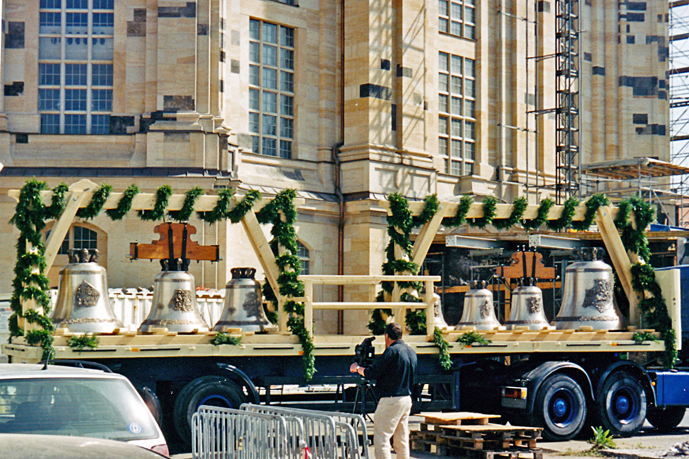 Die sieben neuen Glocken der Dresdner Frauenkirche auf dem Neumarkt vor der Glockenweihe im Mai 2003 (v.l.n.r.): Johannes, Jeremia (mit Holzjoch) und Josua für Turm E; Hannah, Philippus, David (mit Holzjoch) und Jesaja für Turm C. (Scan vom Analogbild)